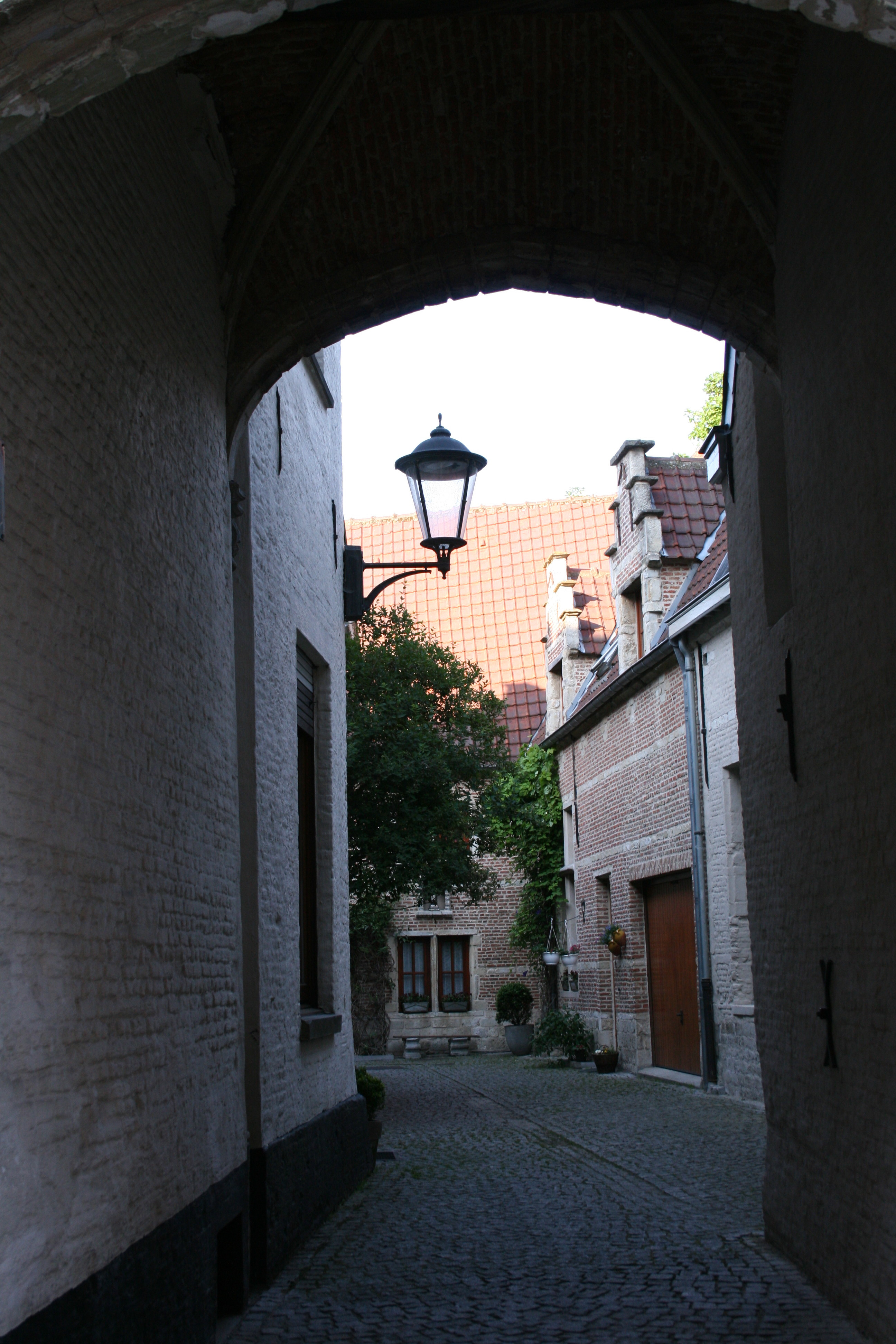 Jezuspoort, Nonnenstraat, Mechelen (Belgium). Groot Begijnhof (Large Beguinage)